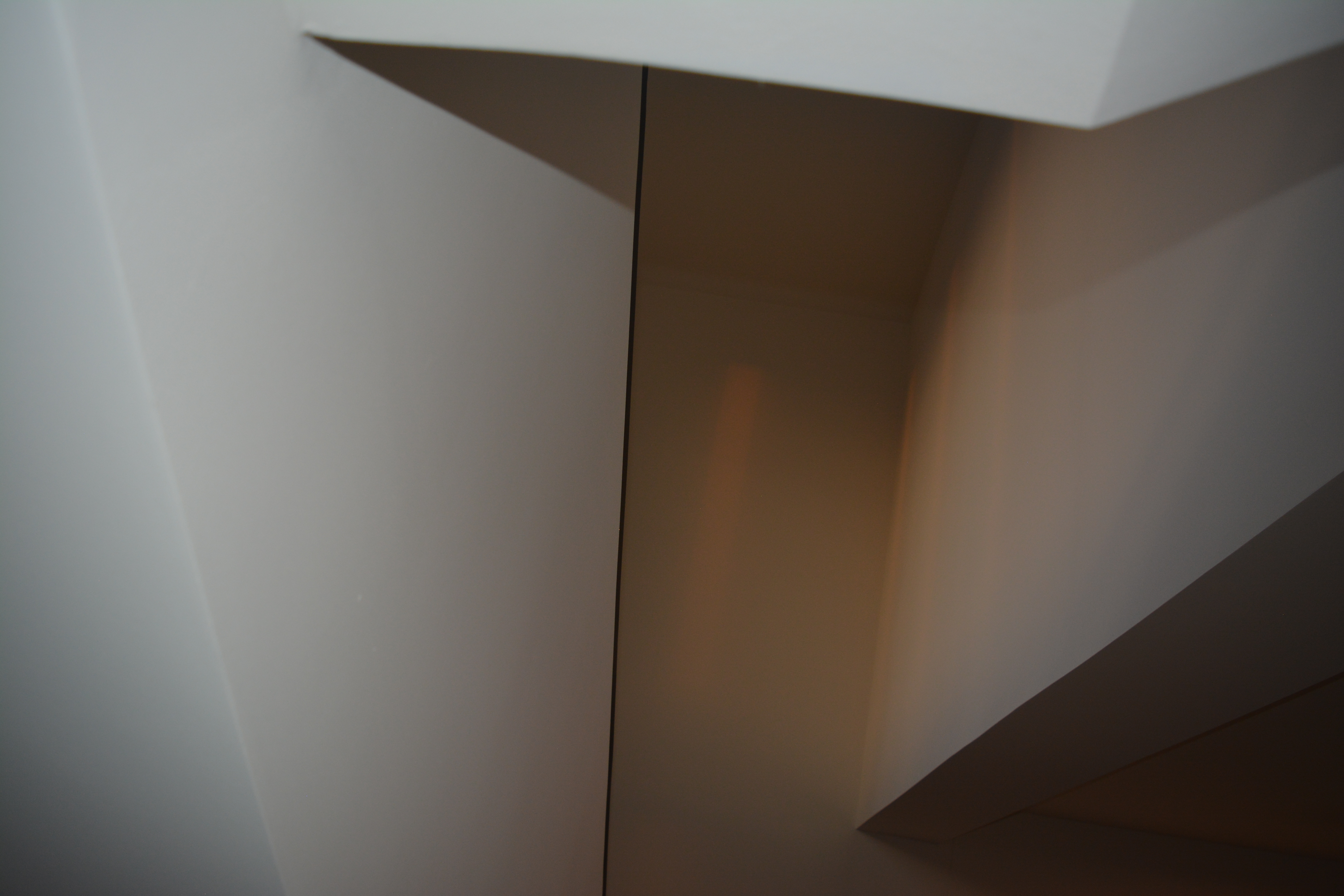 Durch Lichteinfall und Sonnenbestrahlung zu unterschiedlichen Tageszeiten verwandelt sich ein ansonsten kühler, sachlicher Raum wie eine Sinnestäuschung in etwas unvorhersehbares Neues.